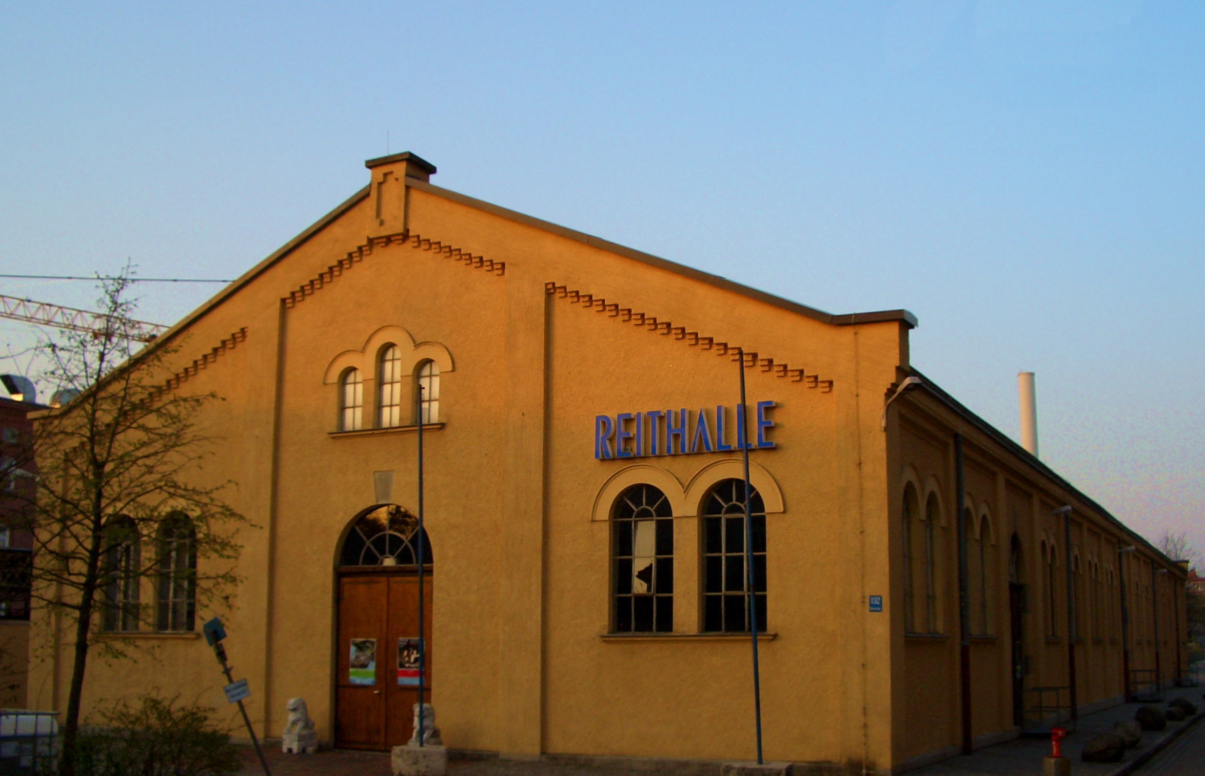 Reithalle München, Teil der ehemaligen Oberwiesenfeldkaserne